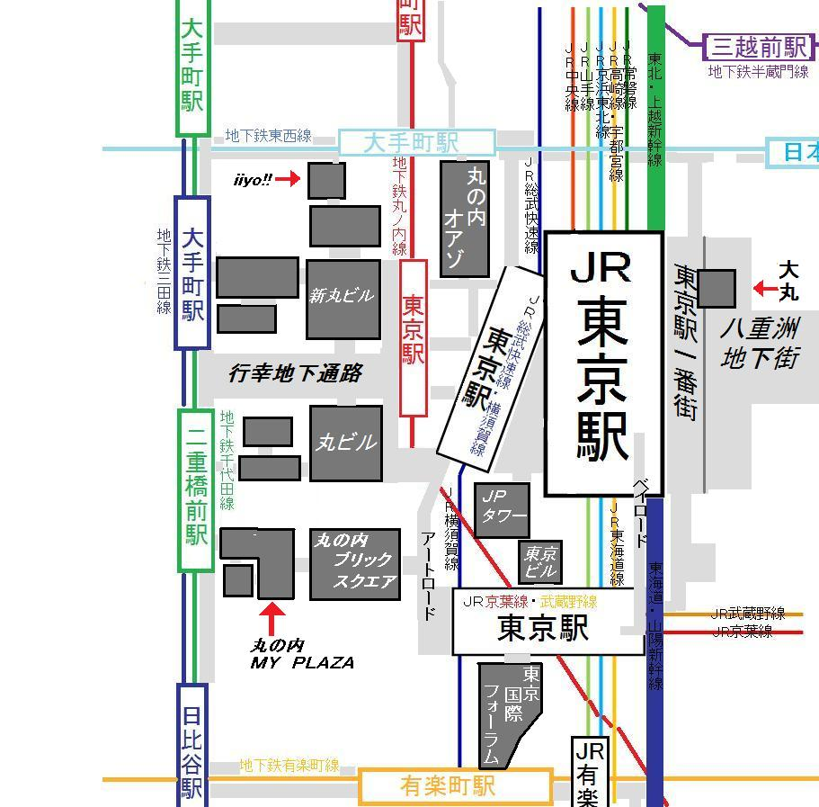 地下通路、地下街、周辺ビル地下も記載。 ※東北縦貫線開業後です※ 無断転載・トレース等は行っておりません